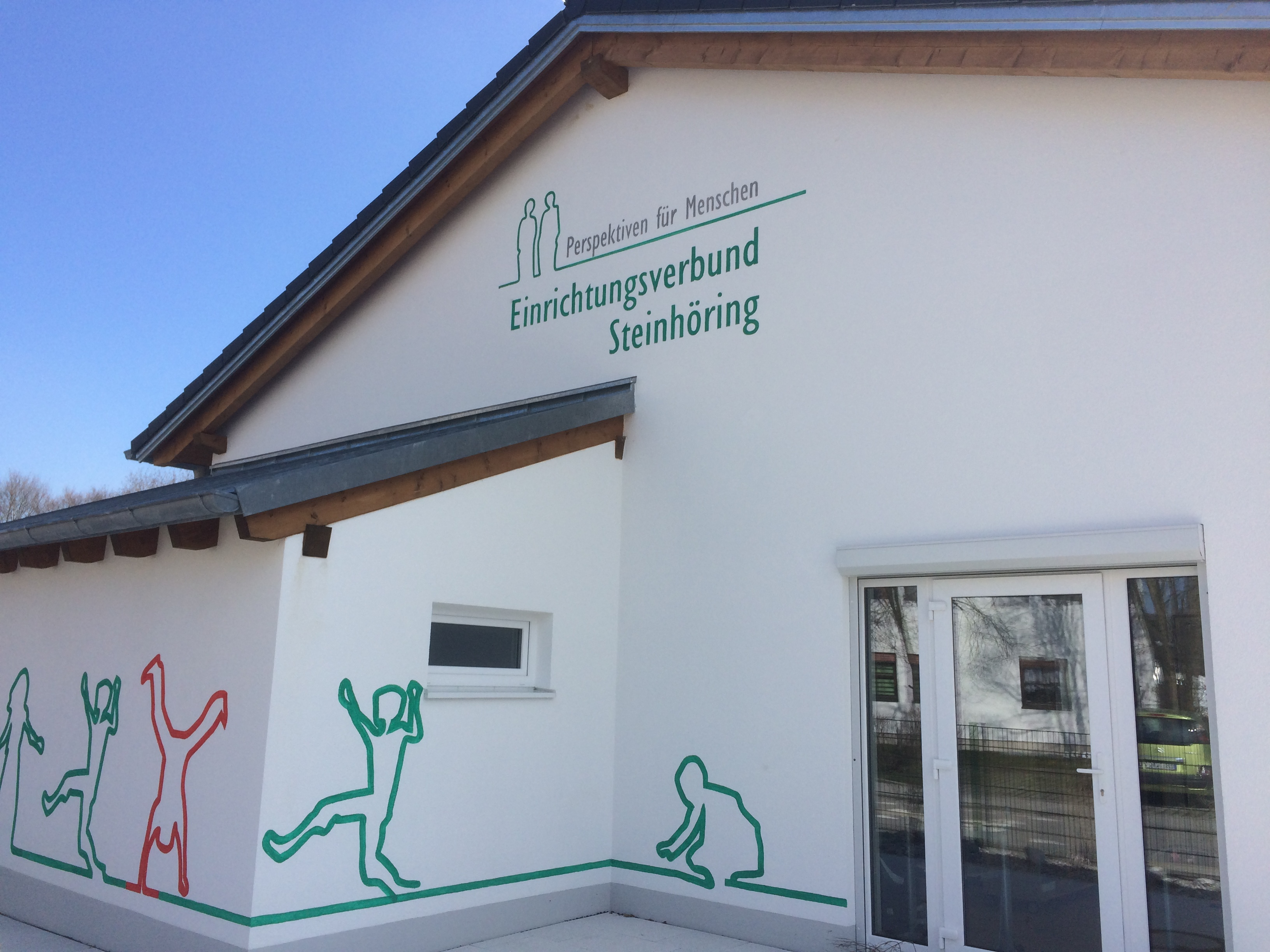 Kindergarten St. Gallus Steinhöring im März 2016